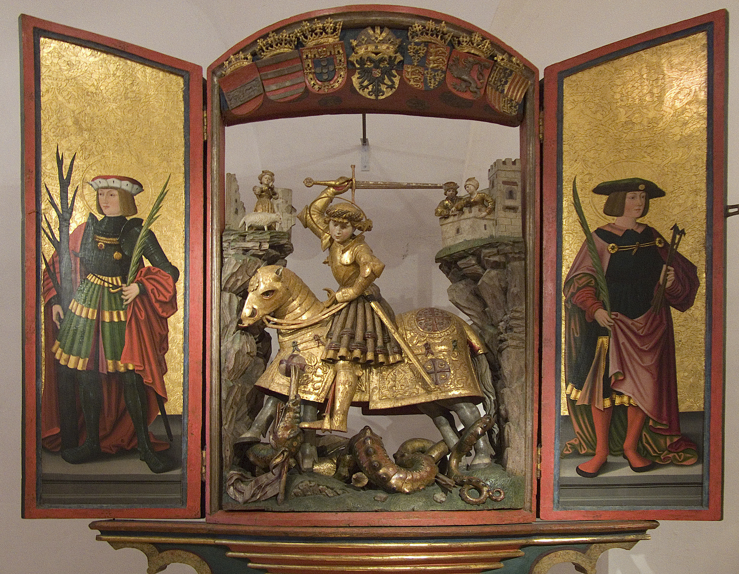 Der Georgsaltar in Schloss Ambras. Der Bildschnitzer war Sebald Bocksdorfer und der Maler hieß Sebastian Scheel.